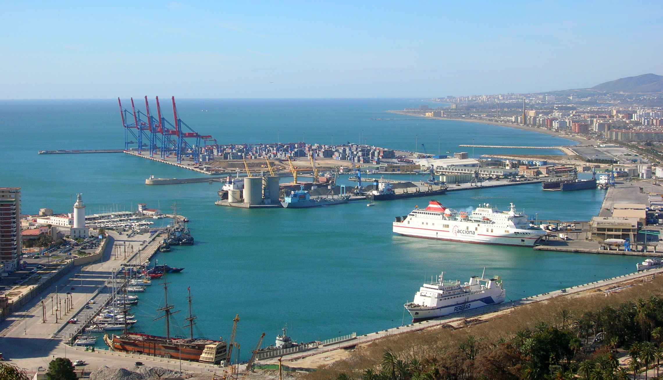 Port de Málaga (Andalousie, Espagne), depuis le Castillo de Gibralfaro